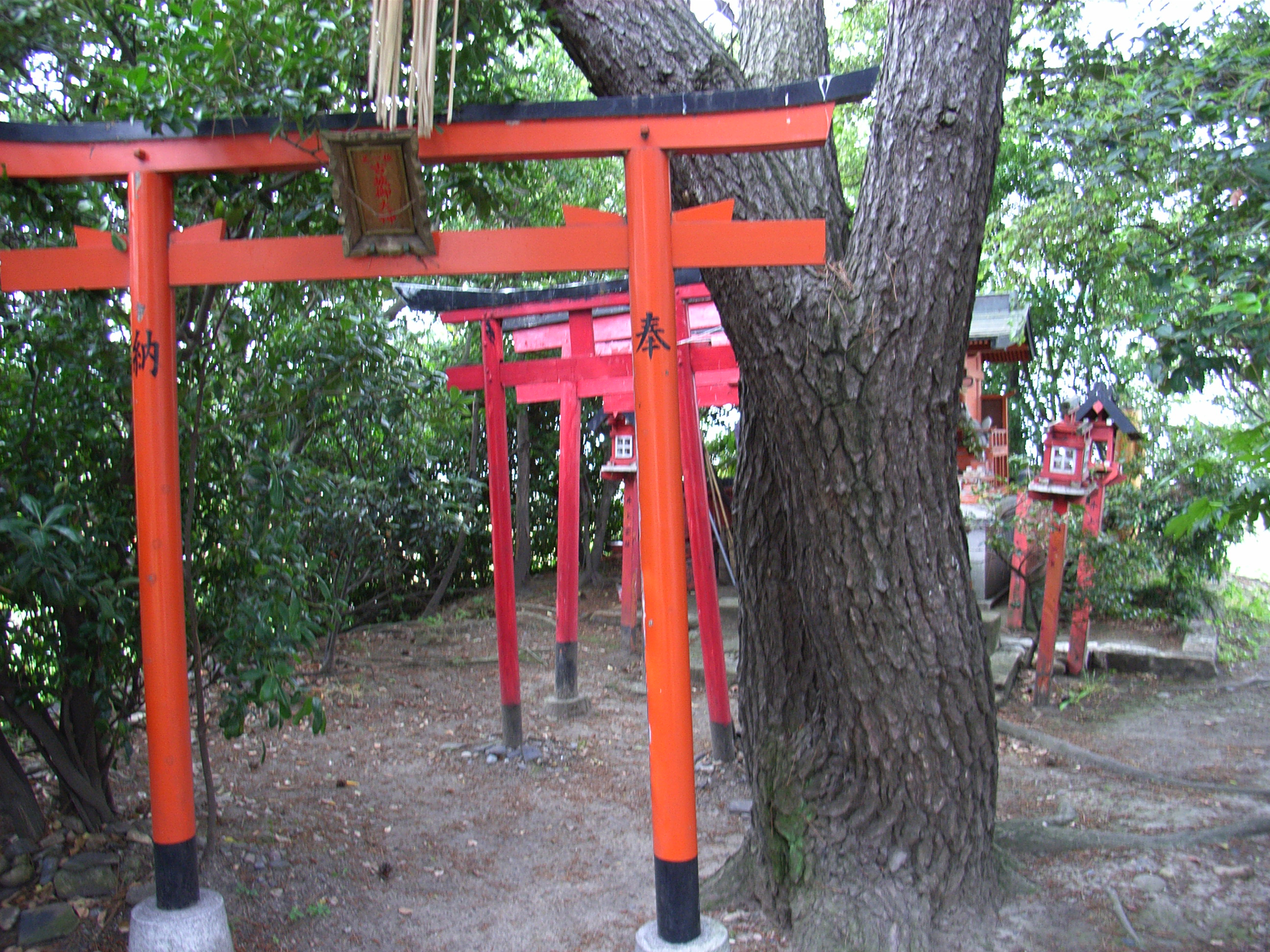 船上城跡の祠